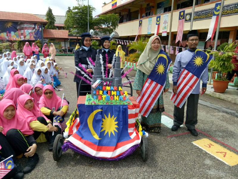 PELANCARAN